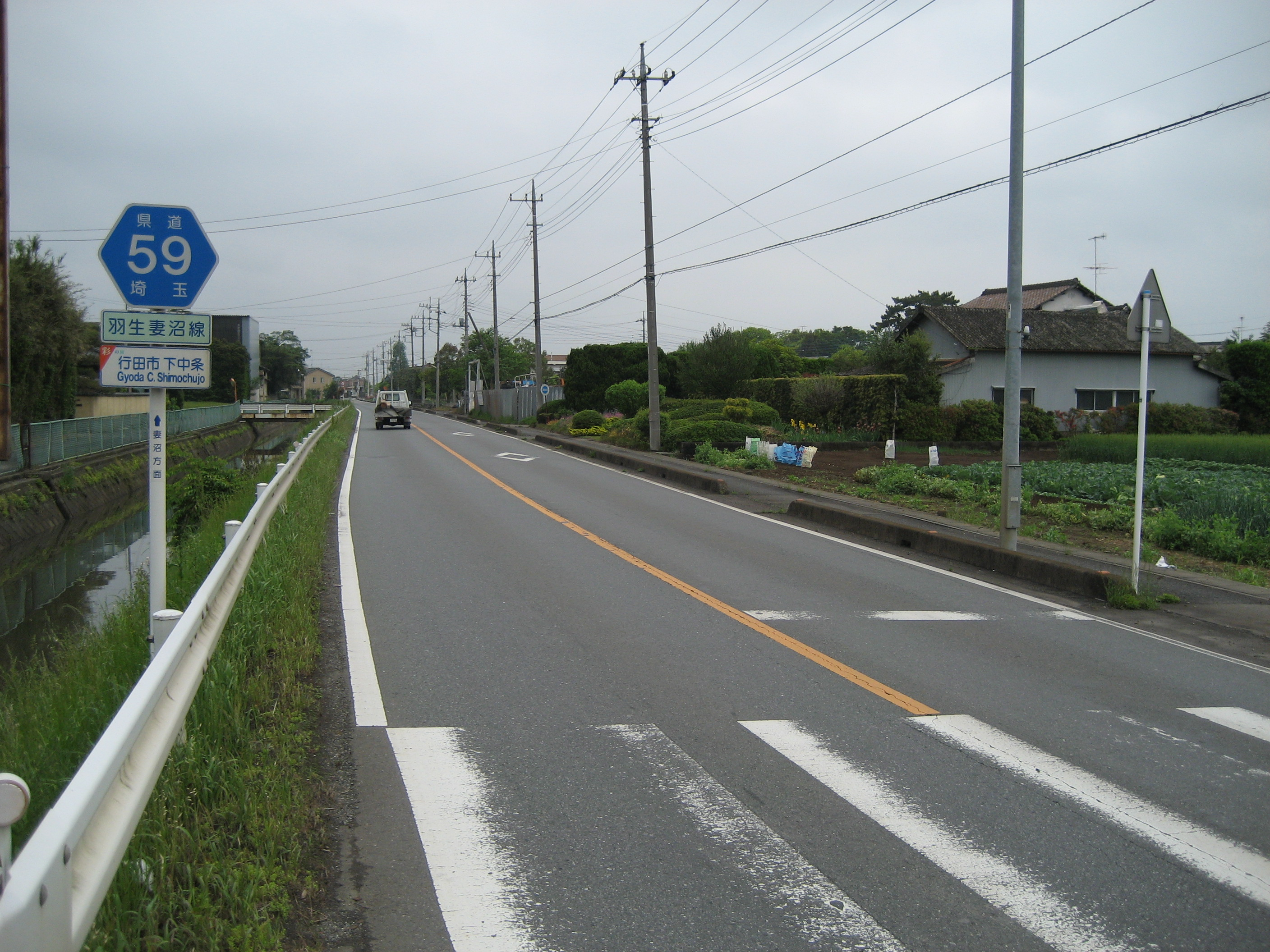 埼玉県道59号線行田市内